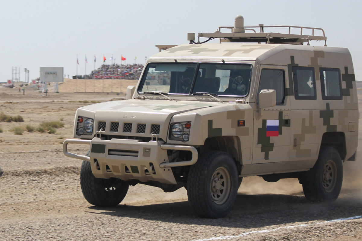 Соревнования международного конкурса «Безопасная среда» Армейских международных игр-2017 (полигон Корла, КНР)